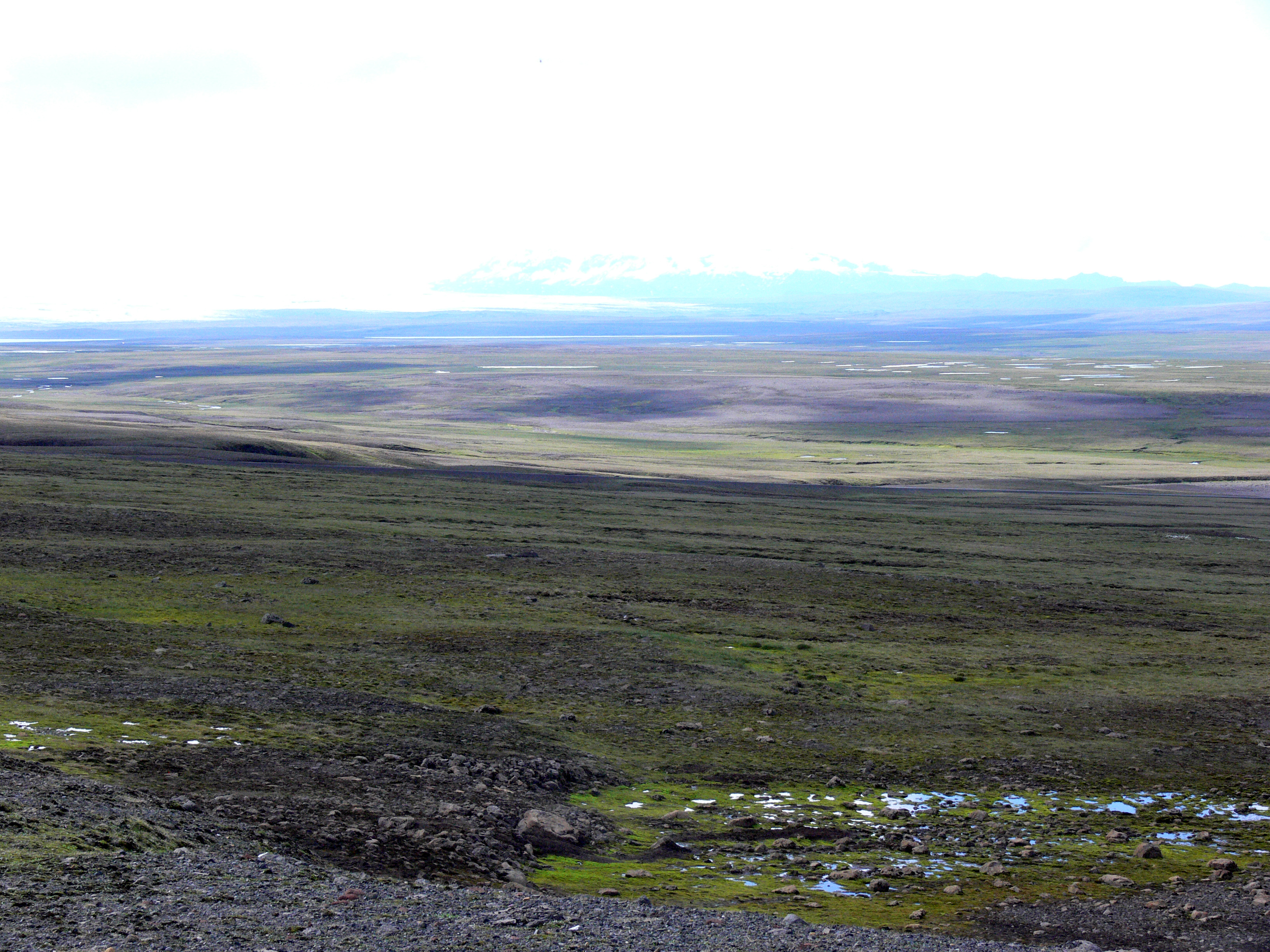 Vesturöræfi in der Nähe von Snæfell in Ostisland.